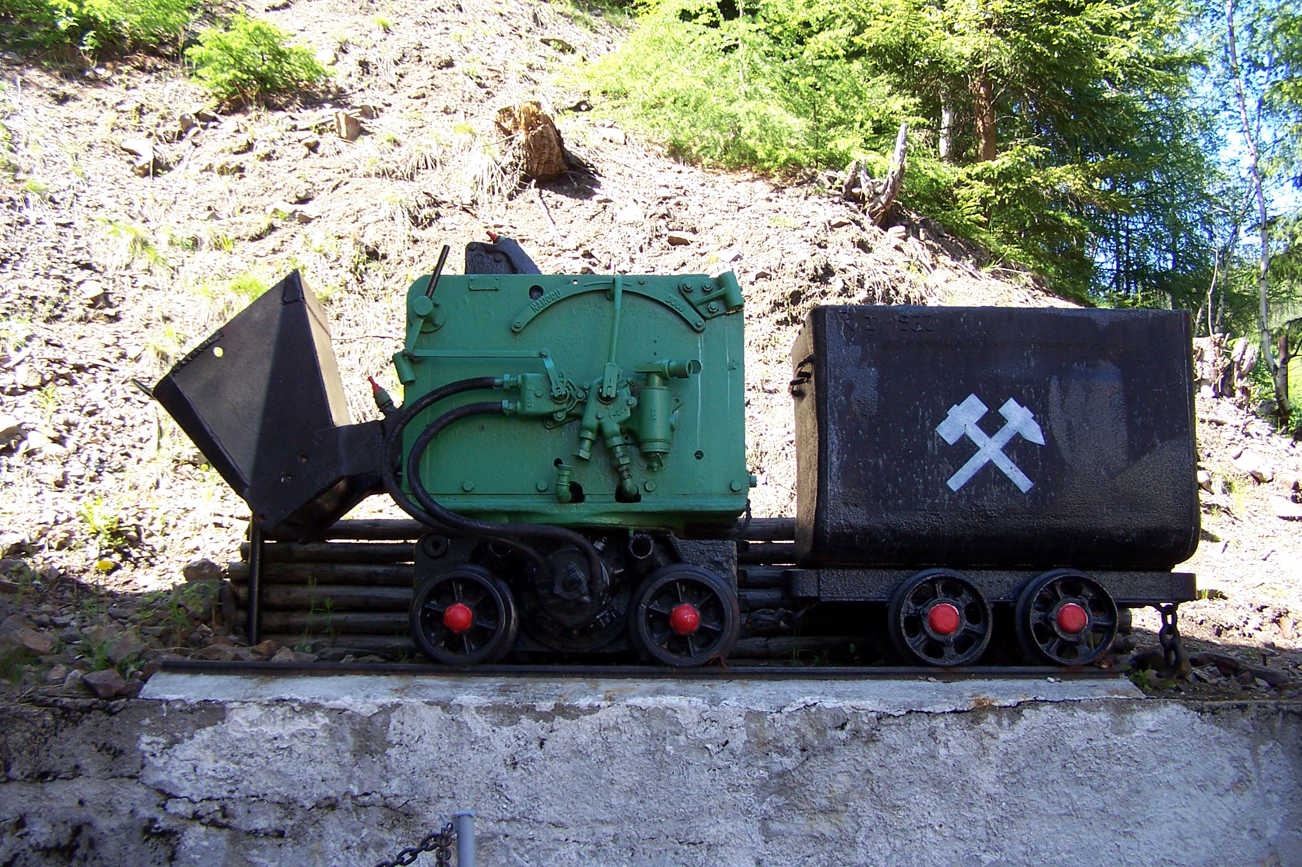 Areál dolu Svornost